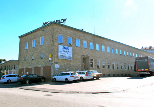 Assa Abloy på Bruksgatan och Lantvärnsgatan i Sandarna i Göteborg. Tidigare Fix-fabriken.